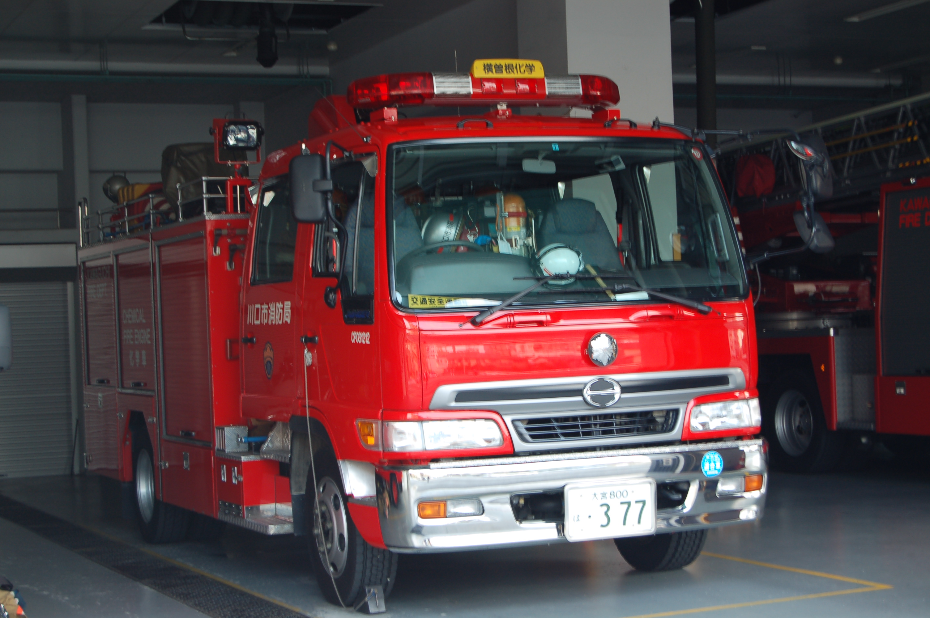 川口市消防局南消防署横曽根分署化学車 横曽根化学1